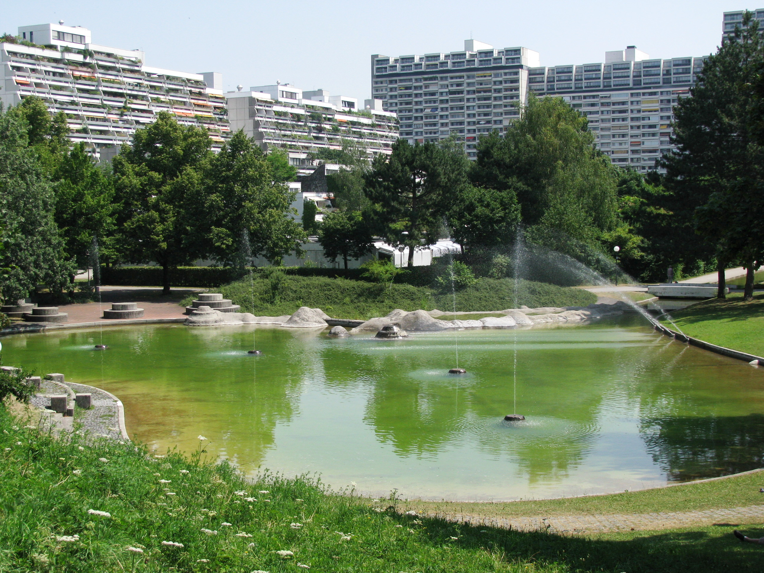 Nadisee aus südwestlicher Richtung